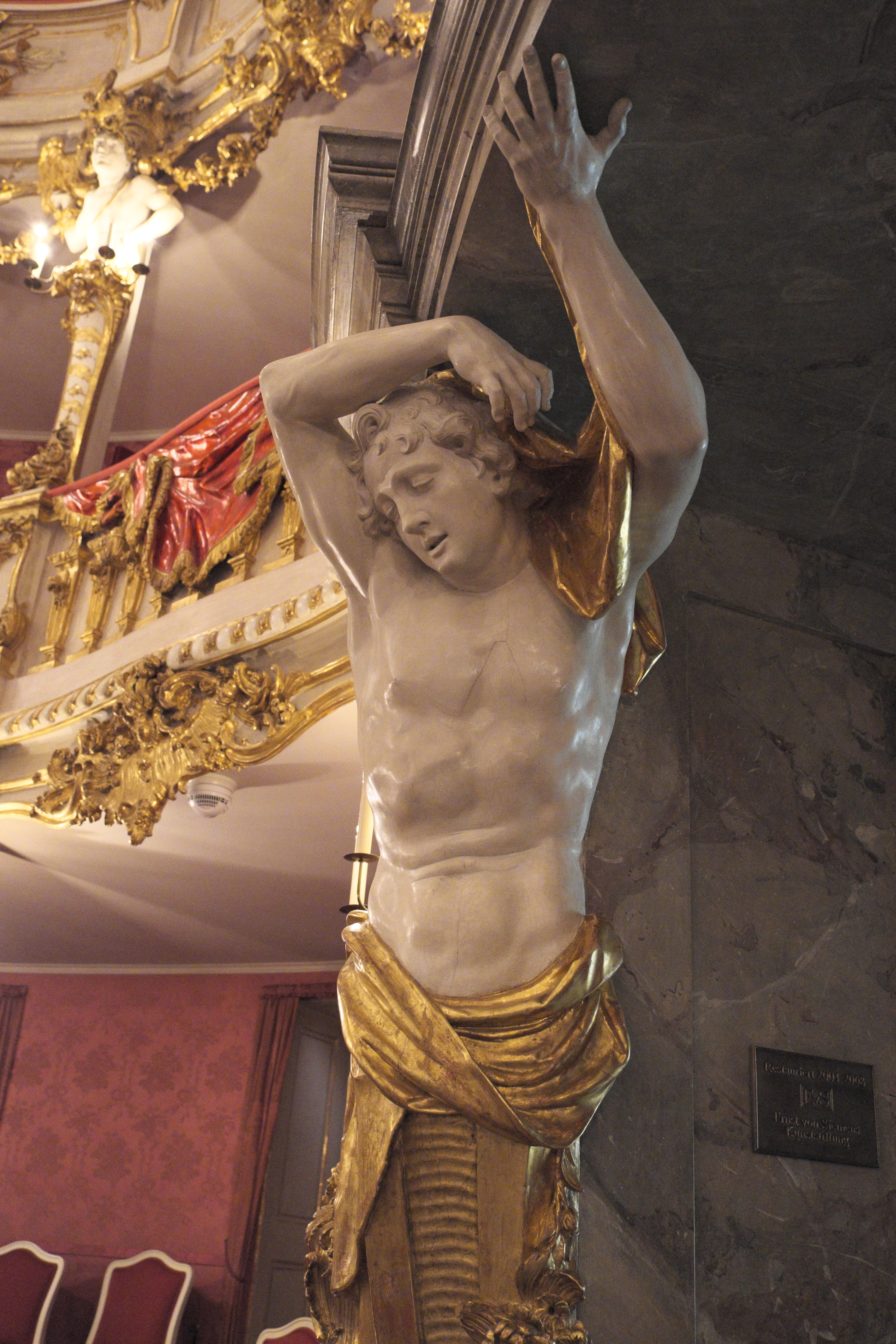 Cuvilliés-Theater in der Münchner Altstadt im Stadtbezirk Altstadt-Lehel (Bayern/Deutschland)